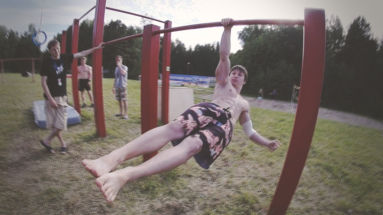 он арм ф